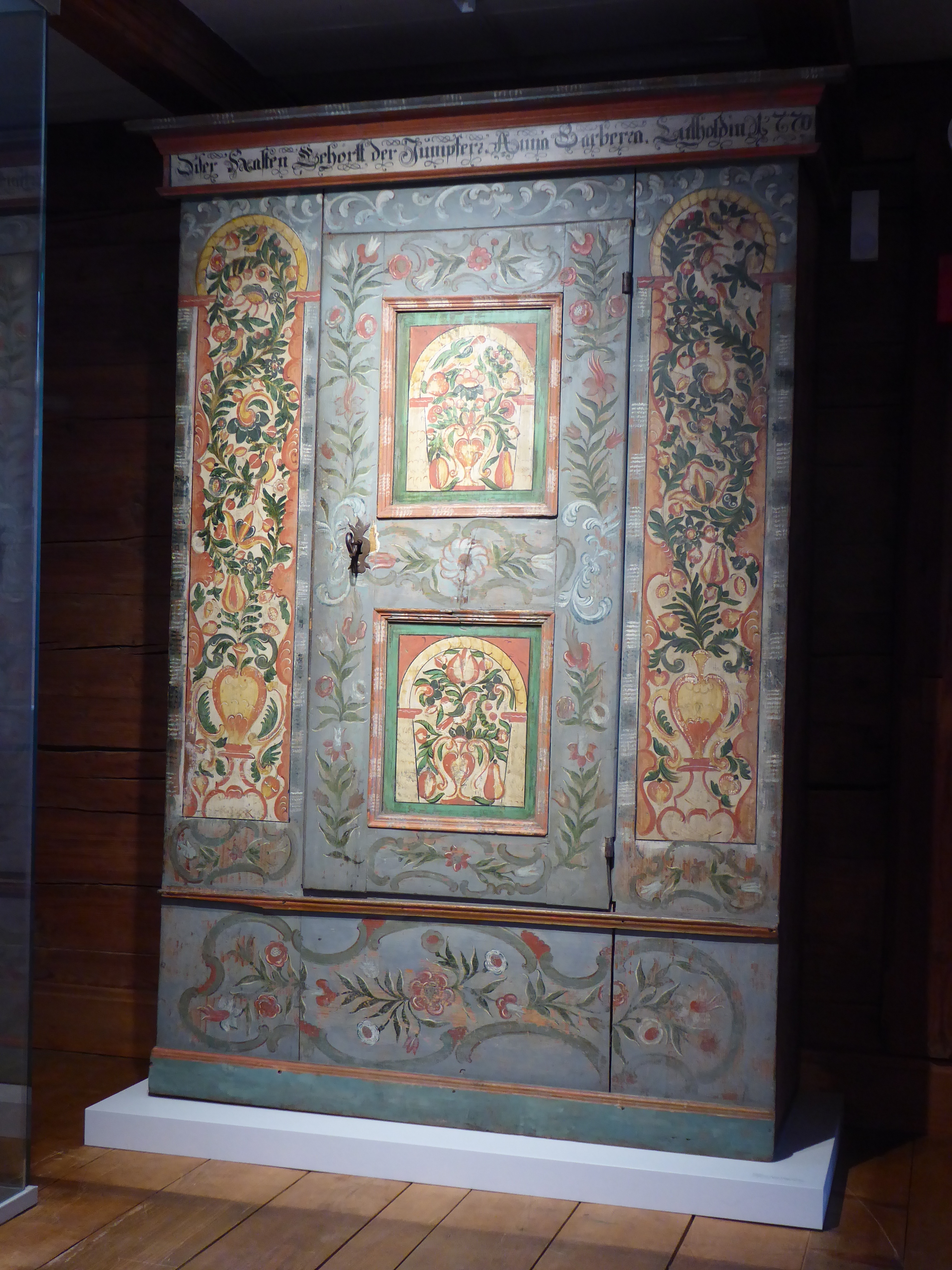 Schrank eines unbekannten Malers mit der Aufschrift «Dieser Kasten Gehört Jungfer Anna Barbara Lütholdin 1770»